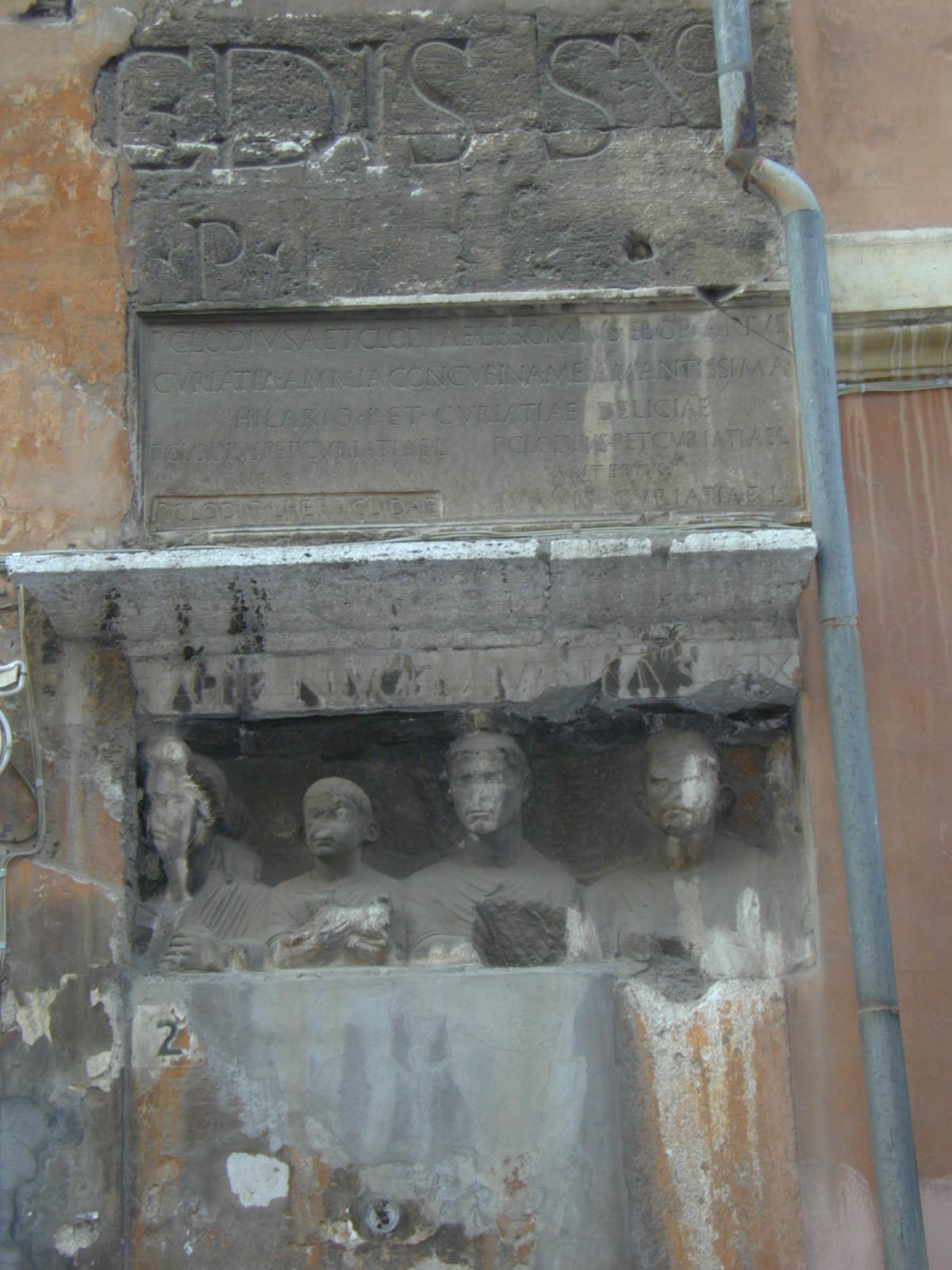 Roma, Portico di Ottavia: inserzioni romane nel muro di casa Manili